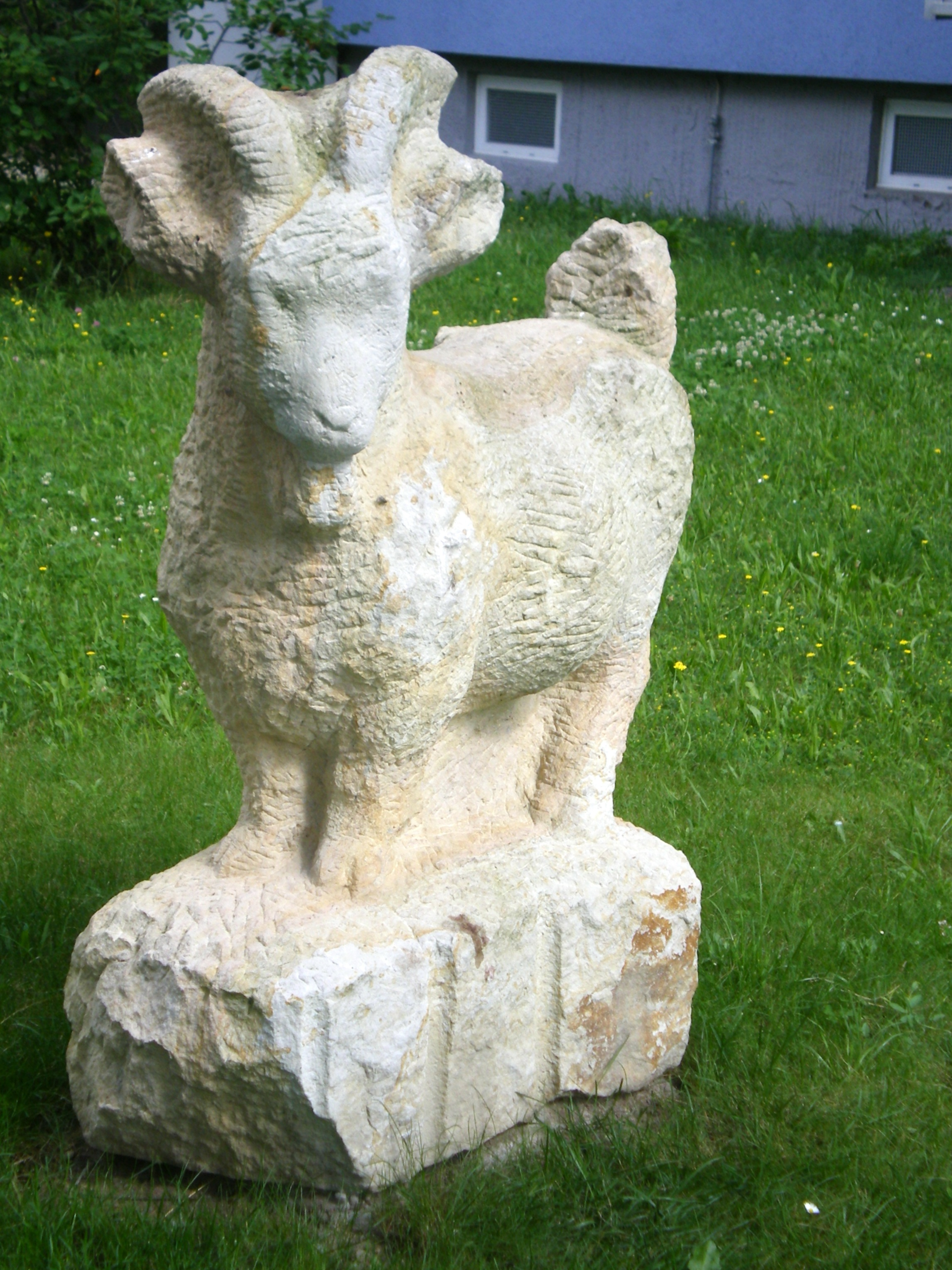 Die Striesener Straße ist eine zwischen Straßburger Platz und Pirnaischem Platz verlaufende Straße in Dresden. Eva Backofen, schuf dieses Werk beim Bildhauersymposium „Sandstein & Platte“, Wohnungsgenossenschaft Johannstadt (WGJ) im Jahr 2007.